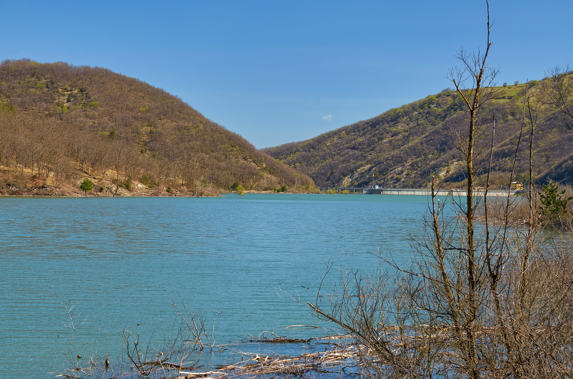 La diga da circa un chilometro e mezzo